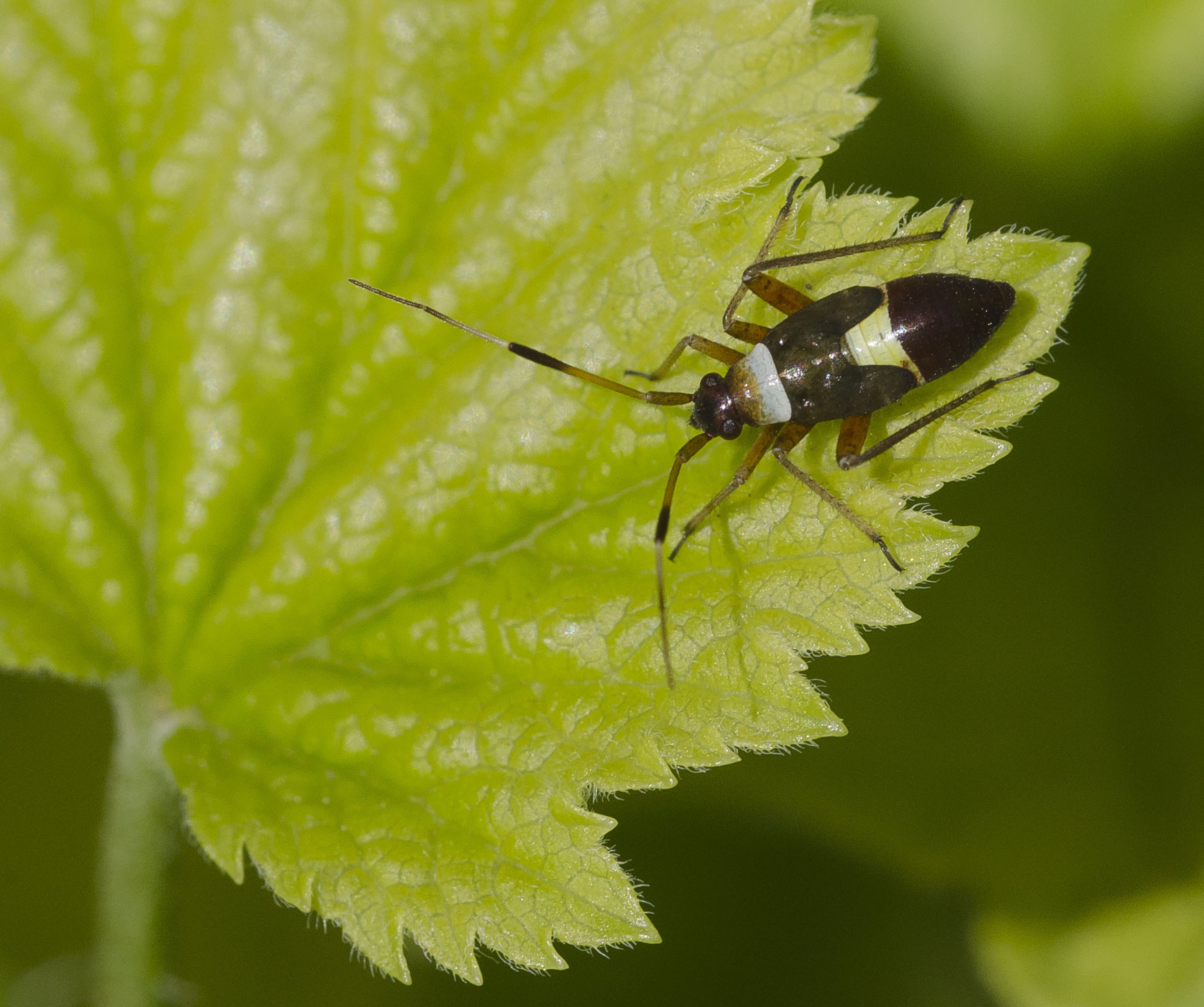 Closterotomus biclavatus, Larve, Stuttgart. Dank an die Mitglieder von Entomologie.de für die Bestimmung.